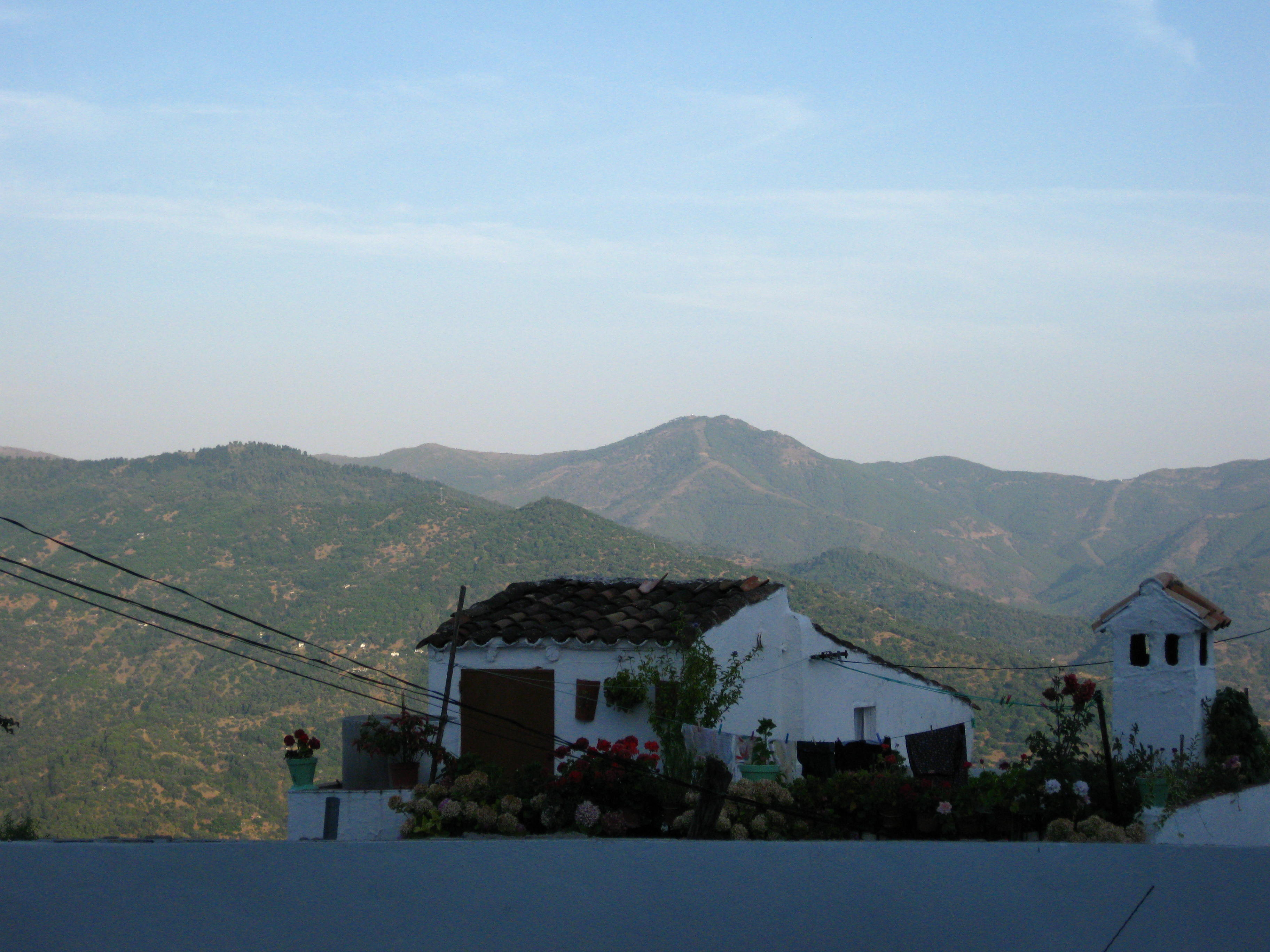 Vue de la Sierra de Ronda depuis Algatocin